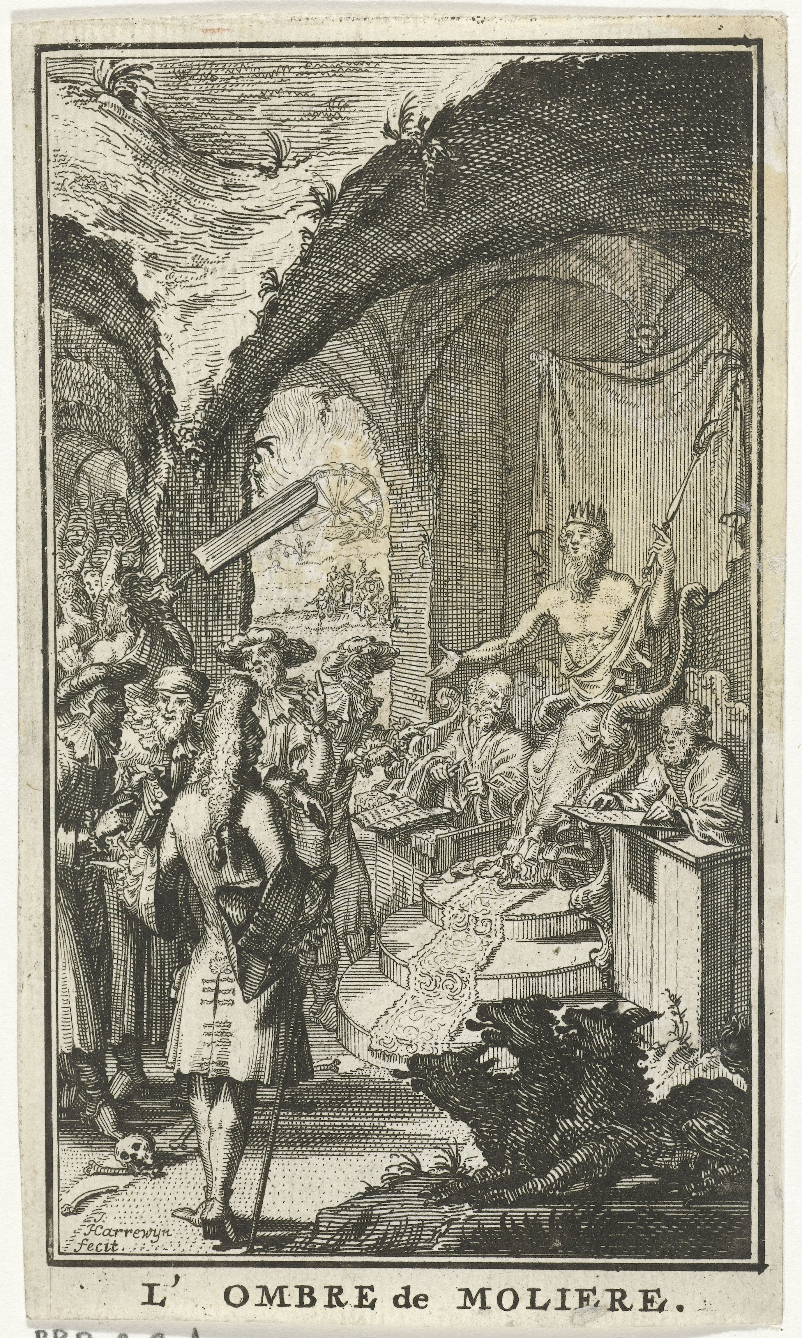 IdentificatieTitel(s): Molière voor de rechters van PlutoL'ombre de Moliere (titel op object)Titelpagina voor: L'ombre de Moliere, 1683Objecttype: prent titelpagina Objectnummer: RP-P-1878-A-2059Opschriften / Merken: verzamelaarsmerk, verso, gestempeld: Lugt 2228Omschrijving: De recent overleden Molière in Hades voor Pluto op een verhoging, geflankeerd door twee schrijvende rechters. Op de voorgrond de driekoppige hond Cerberus en voor de troon enkele mannen in gesprek. Op de achtergrond het vuur van de hel, Waar: in het rad met de vastgebonden Ixion.VervaardigingVervaardiger: prentmaker: Jacobus Harrewijn (vermeld op object)Plaats vervaardiging: NederlandenDatering: 1683Fysieke kenmerken: etsMateriaal: papier Techniek: etsenAfmetingen: blad: h 137 mm (afgesneden op plaatrand) × b 80 mmToelichtingTitelpagina voor: Guillaume Marcoureau de Brécourt, L'ombre de Moliere, comedie. Deel van: Moliere, werken. Amsterdam, Hendrik Wetstein, 1684.OnderwerpWat: Hades, de onderwereldTartarus (and the condemned assigned there)Ixion on a burning wheelCerberus, the three- or many-headed dog; 'Cerbero' (Ripa)Wie: Jean Baptiste Poquelin MolièreVerwerving en rechtenVerwerving: aankoop 7-jan-1878Copyright: Publiek domein